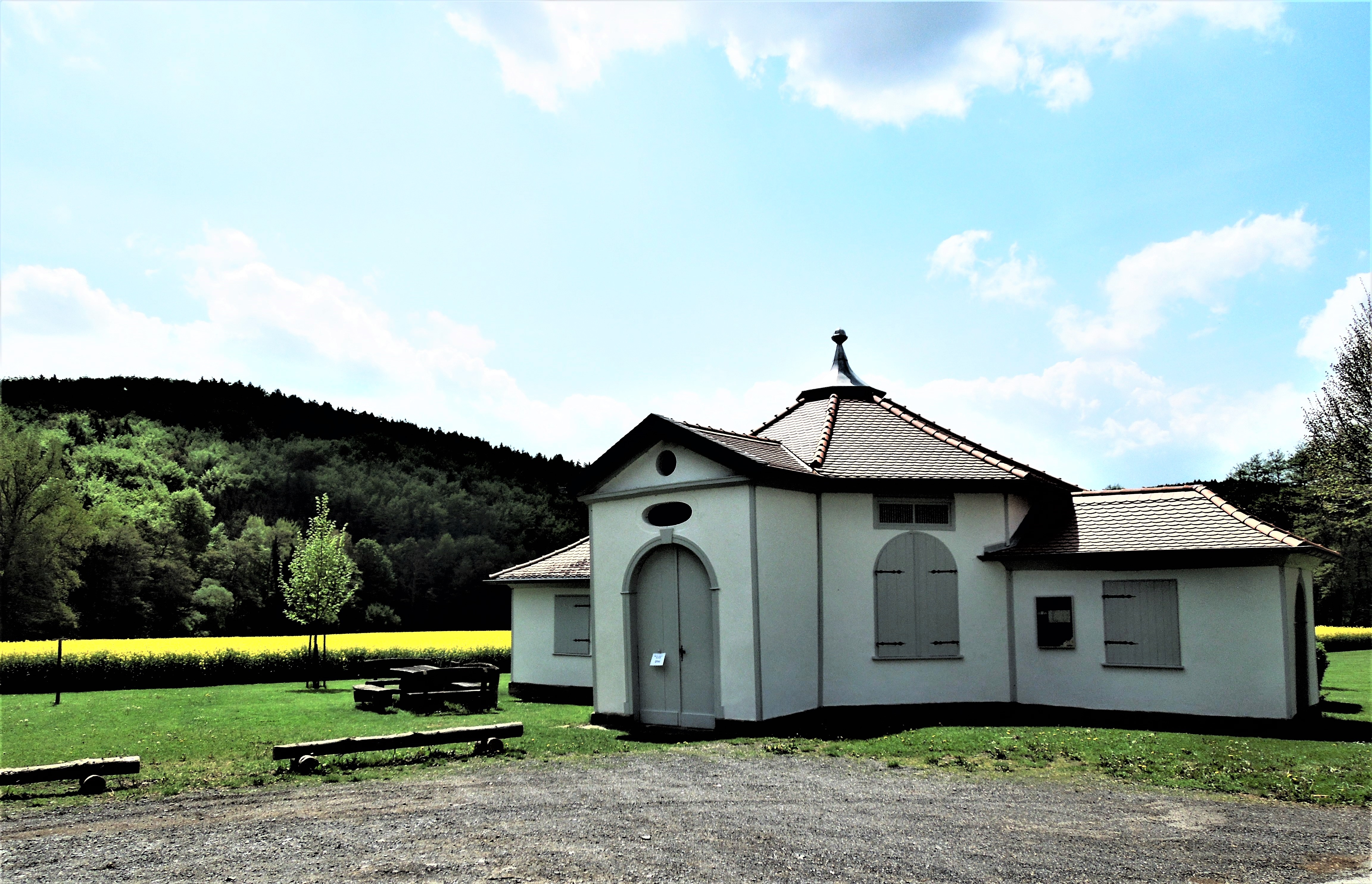 Das renovierte Brunnenhaus der sog. Donarquelle bei Geismar, 2017